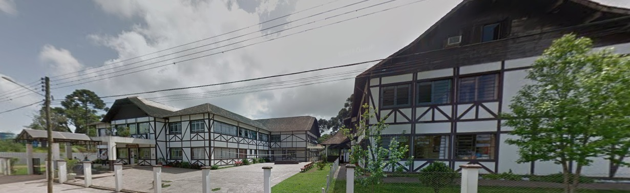 Escola Municipal de Ensino Fundamental Otto Hoffmann